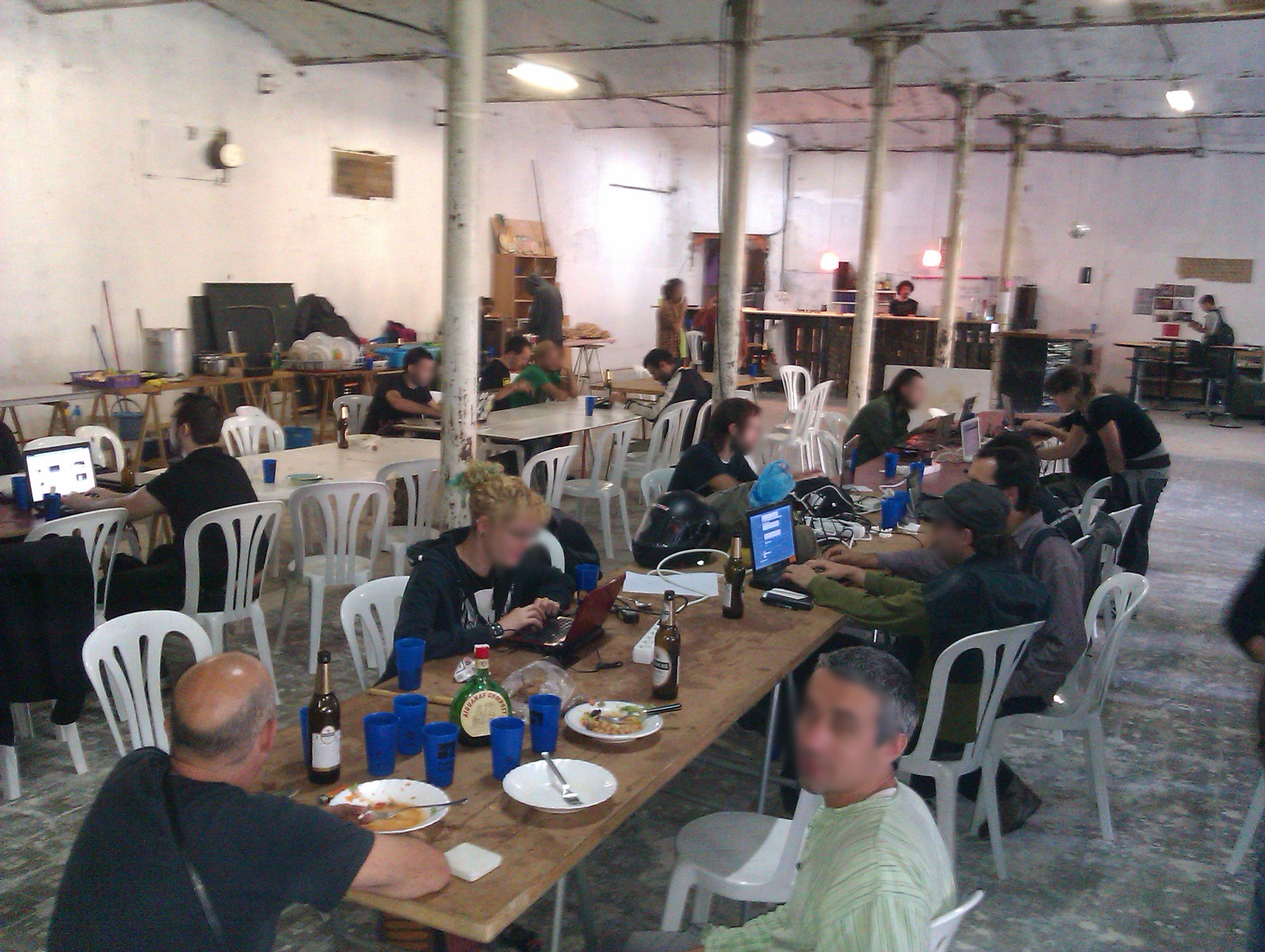 Interior de Ca la Fou durant el hackmeeting Hackafou el 13 d'octubre de 2012. Zona de menjar i trasteig. Vallbona d'Anoia; Colònia Industrial Postcapitalista.